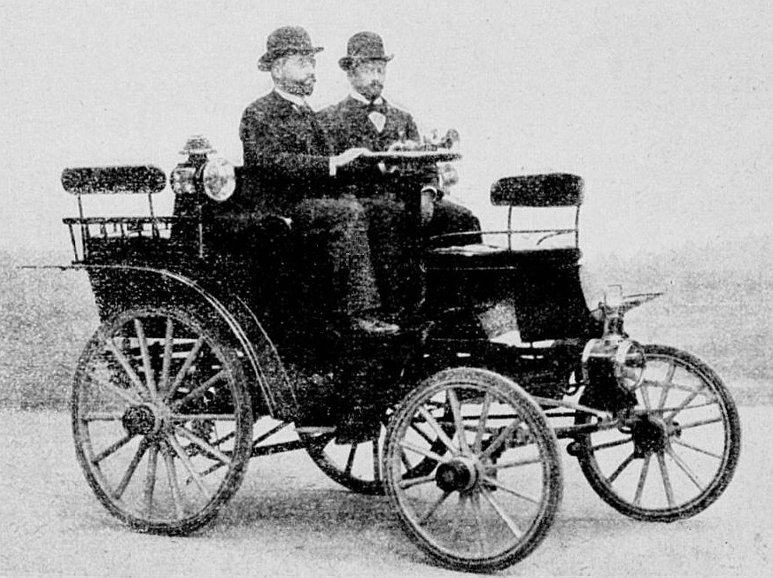 Gustave Gobron (G) et Eugène Brillié (D) en 1898 - L'Almanach des Sports 1899 sous la direction de Maurice Leudet , librairie Paul Ollendorff, p.145